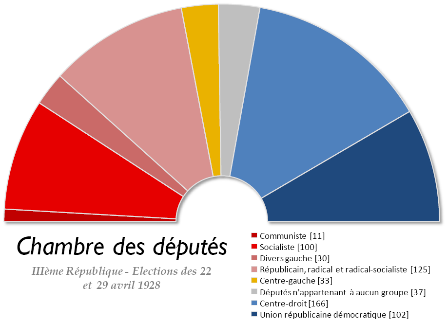 Chambre des députés française issue des élections législatives de 1928